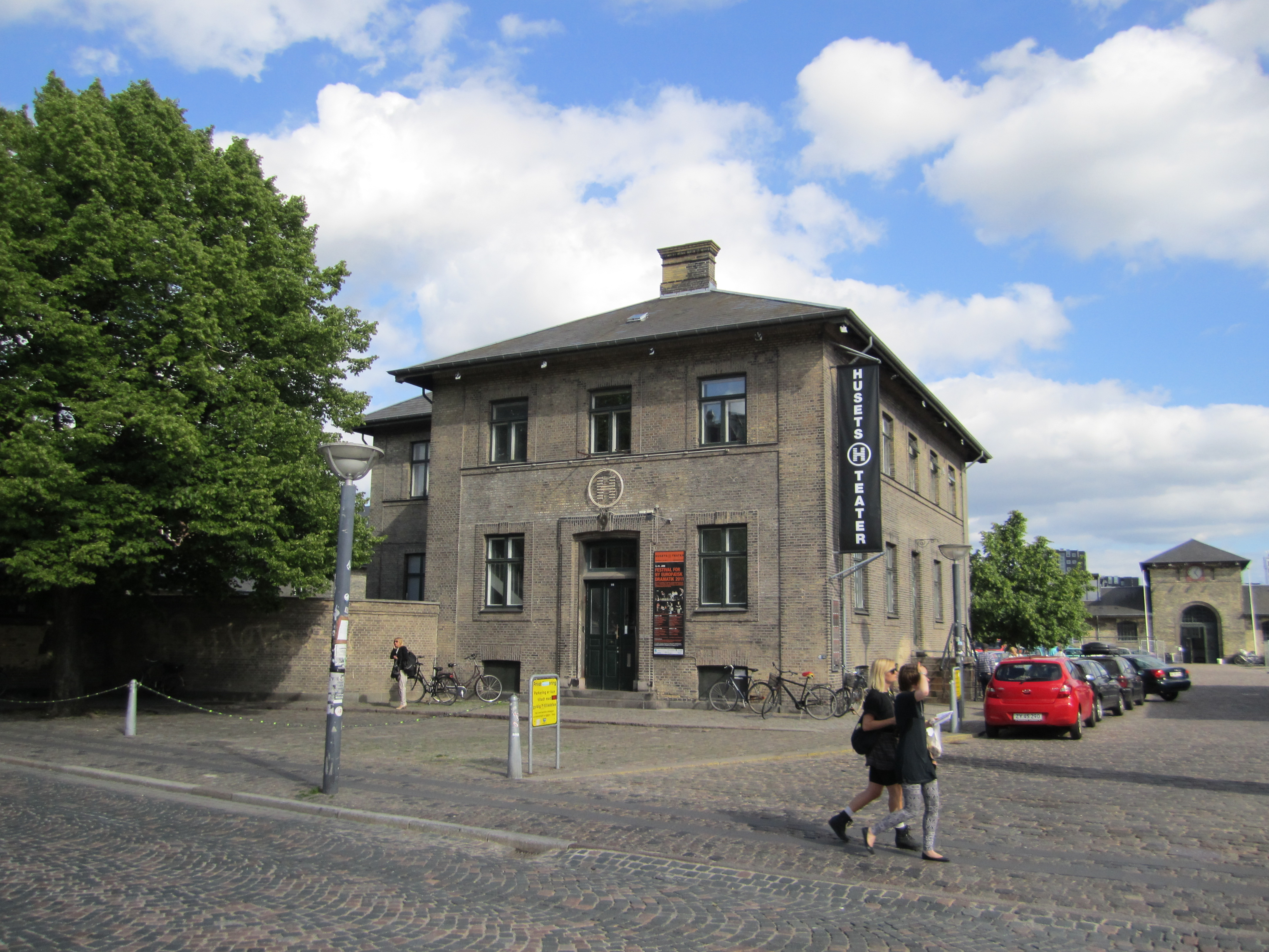 Husets Teater at Halmtorvet in Copenhagen, Denmark